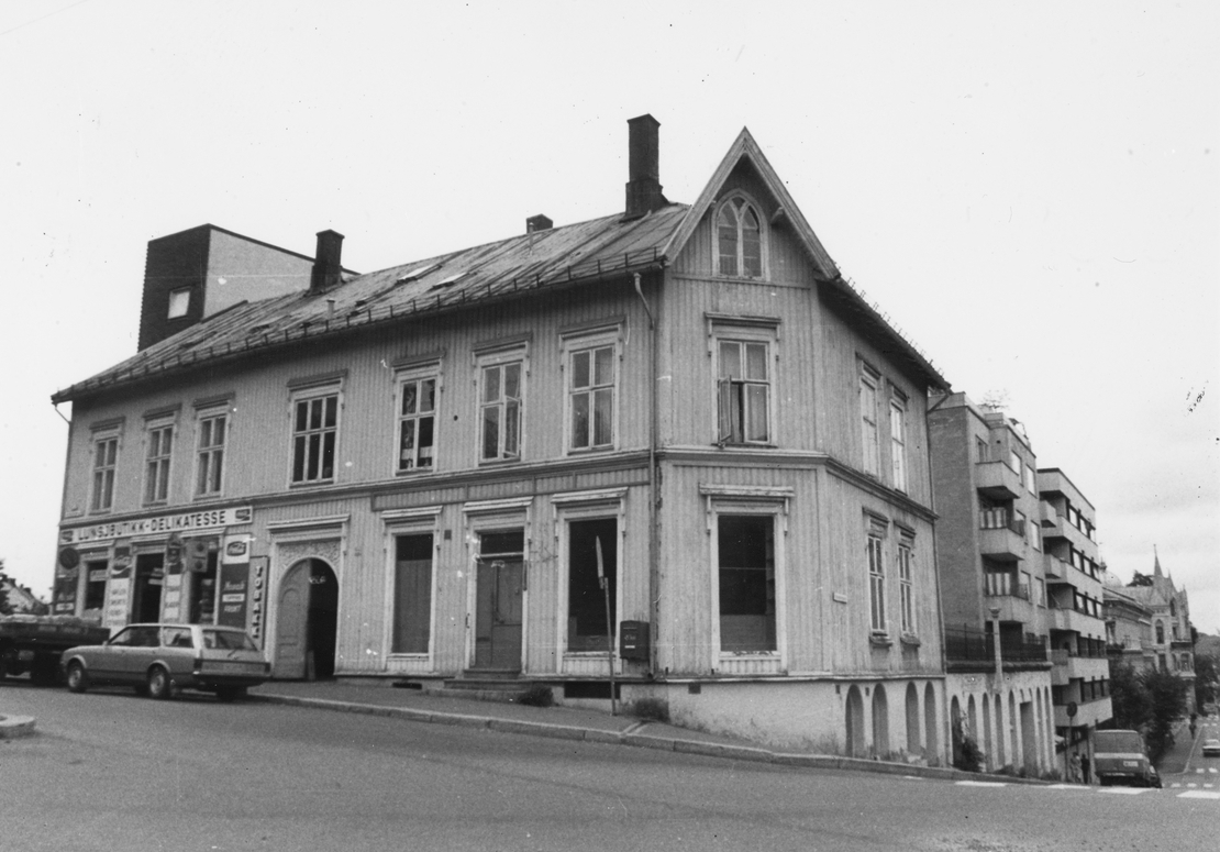 Professor Dahls gate 22 avbildet i 1980, siden revet. Foto: Anne Kathrine Heggebø Breien. Fra Byhitorisk samling hos Oslo Museum.